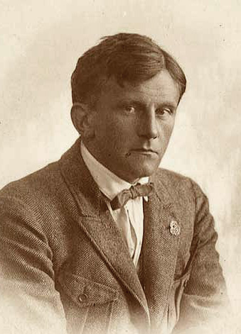 Архітектор Кароль Стриєнський (1887—1932). Фотографія з архіву Музею татранського.